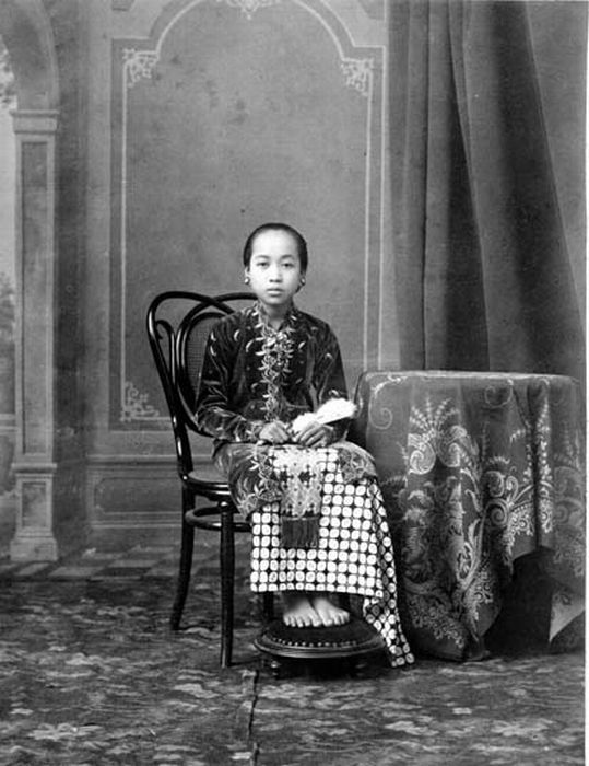 Foto. Waarschijnlijk één van de vrouwen van Hamengkoe Boewono VII. Zij draagt een kaïn panjang met kawung-motief. Studioportret van de Ratu Kencana, vrouw van Hamengkoe Boewono VII, de sultan van Jogjakarta